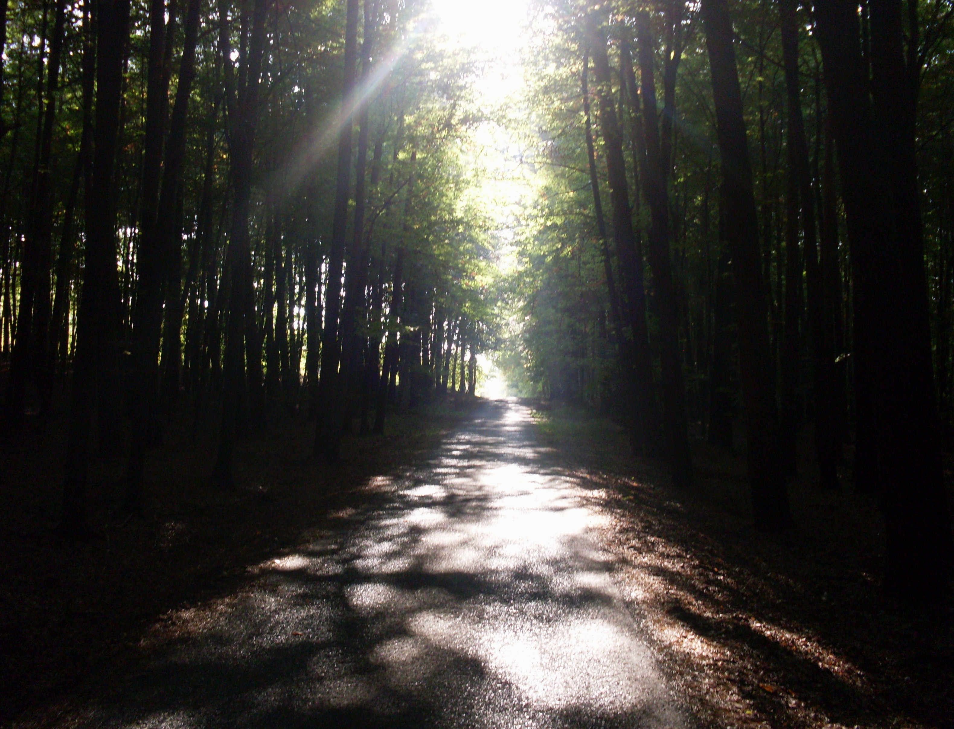 Dolina Borowca.Droga